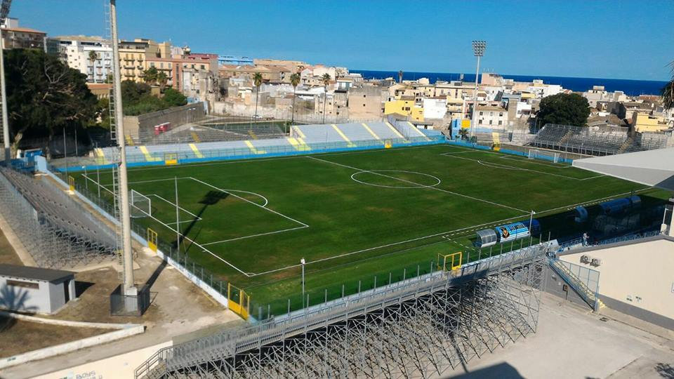 Panoramica Nicola De Simone